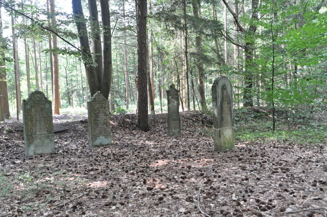 Jüdischer Friedhof in der Wingst 2014